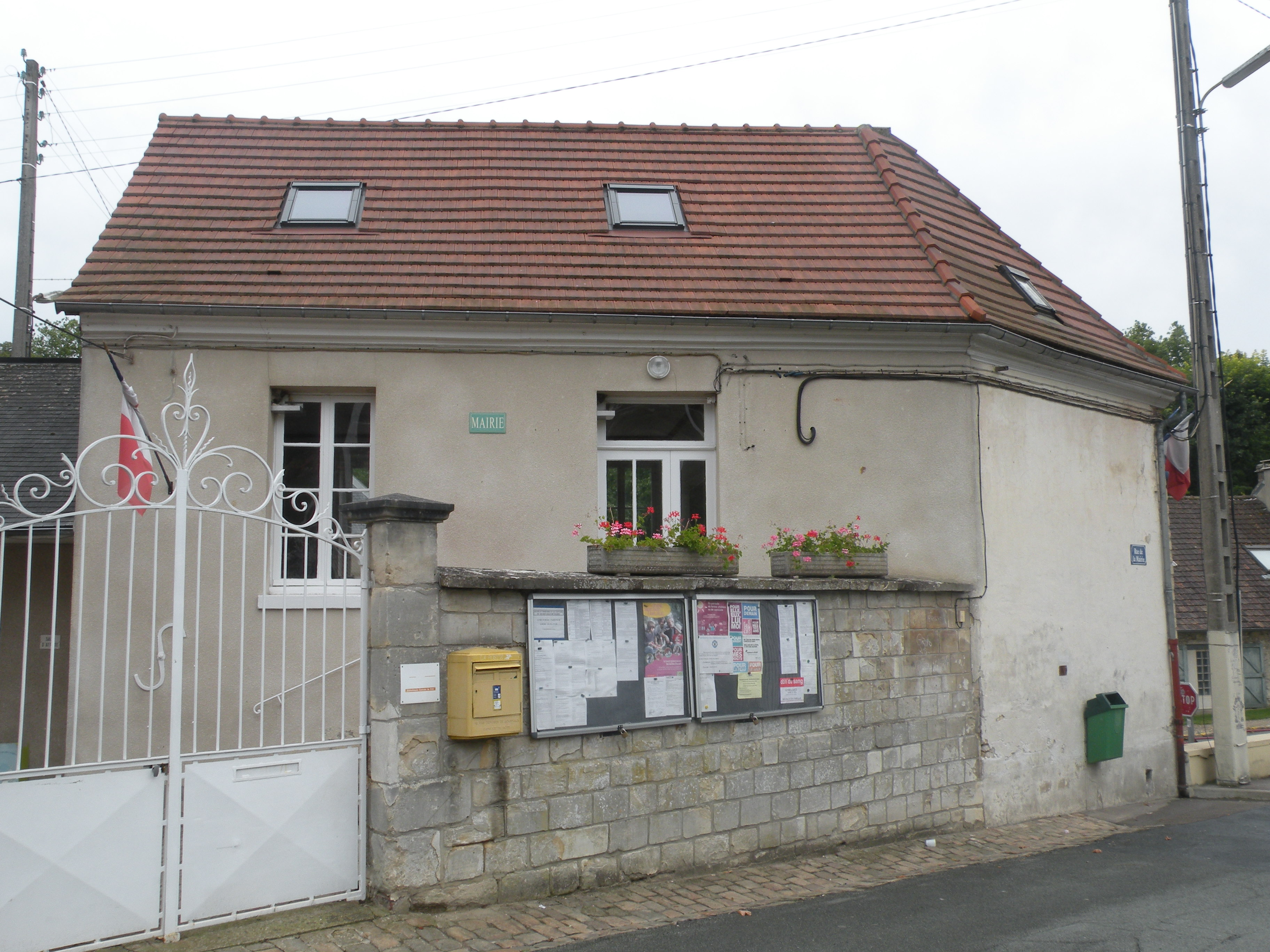 mairie de Puiseux-le-Hauberger